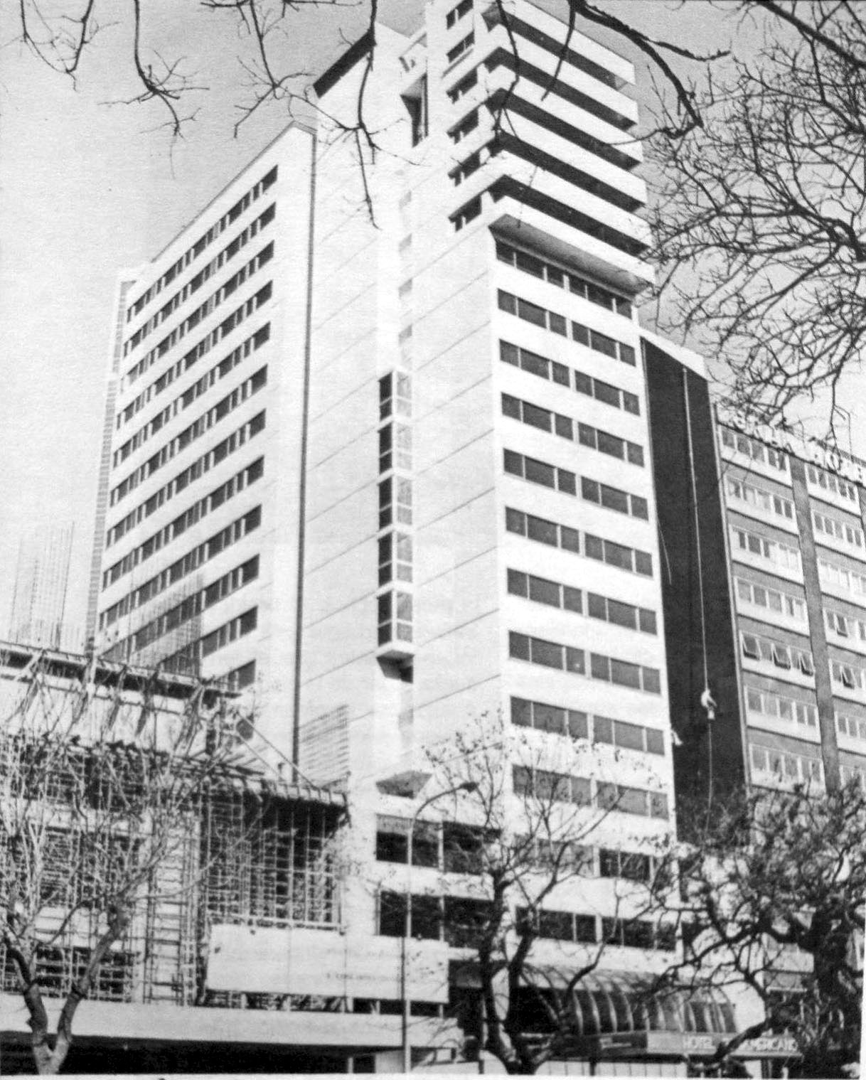 Vista de la Torre Sur del Hotel Panamericano de Buenos Aires, inaugurado en 1981, junto a la estructura inconclusa de la Torre Norte, terminada recién en 1999. Buenos Aires, Argentina.